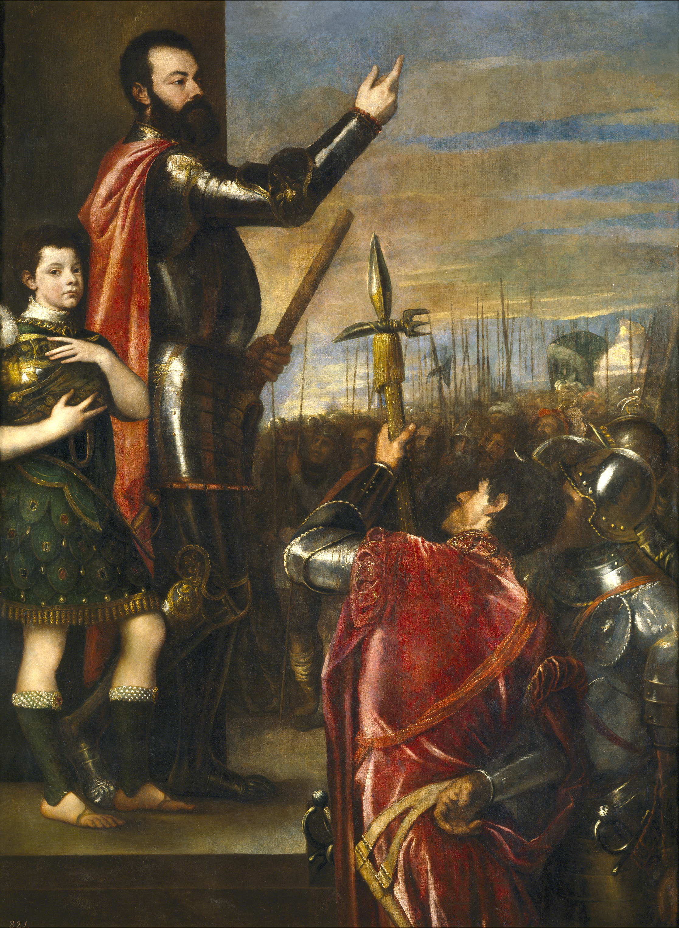 La obra representa a Alfonso de Ávalos (1502-1546), VI marqués de Pescara y II marqués del Vasto, dirgiéndose a los soldados españoles que se amotinaron en Lombardía en 1537.